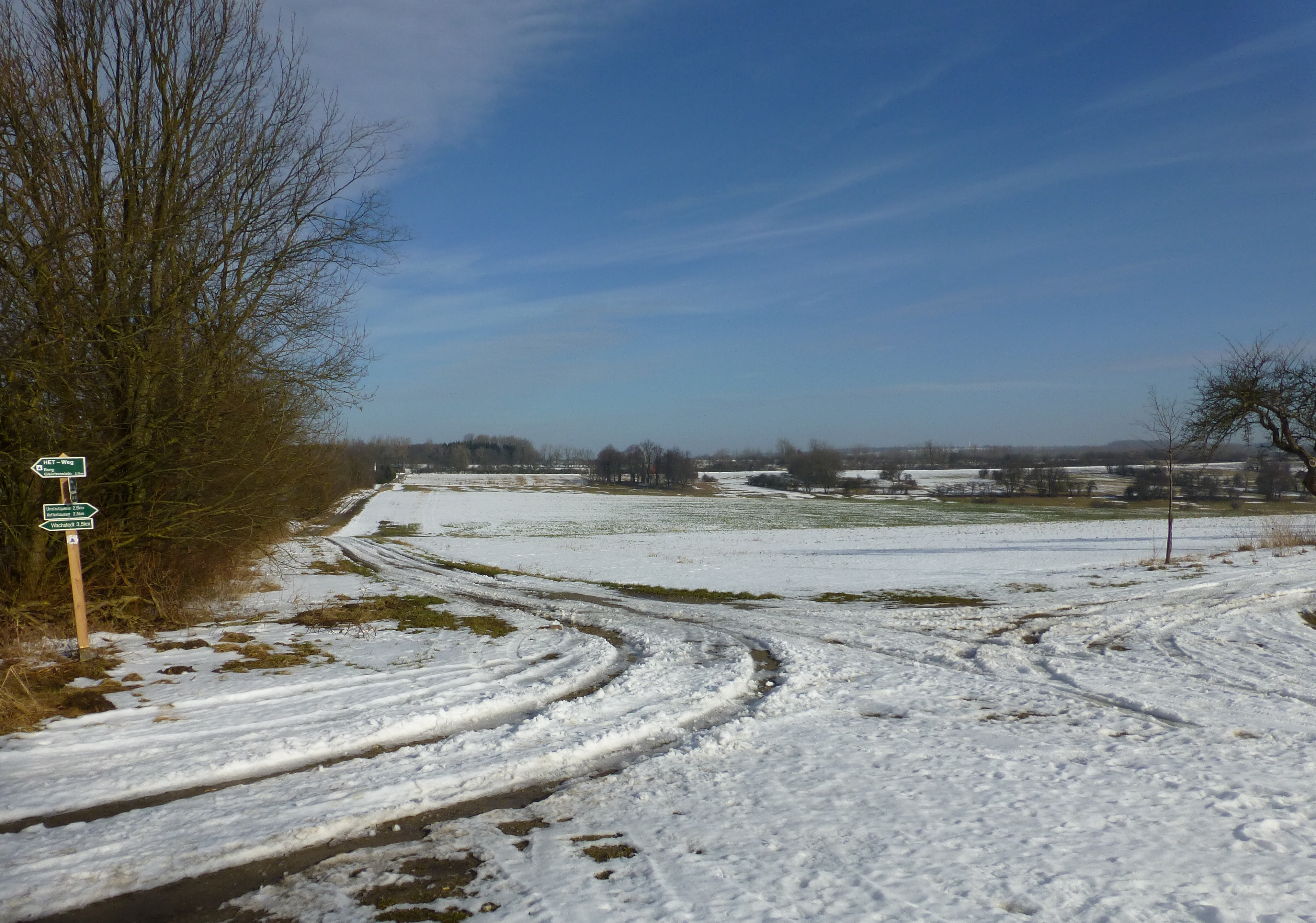 Blick von der alten Straße Keff.-Heuth. in Richtung Werdigeshausen